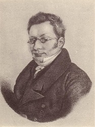 Владимир Иванович Штейнгель (1783-1862)